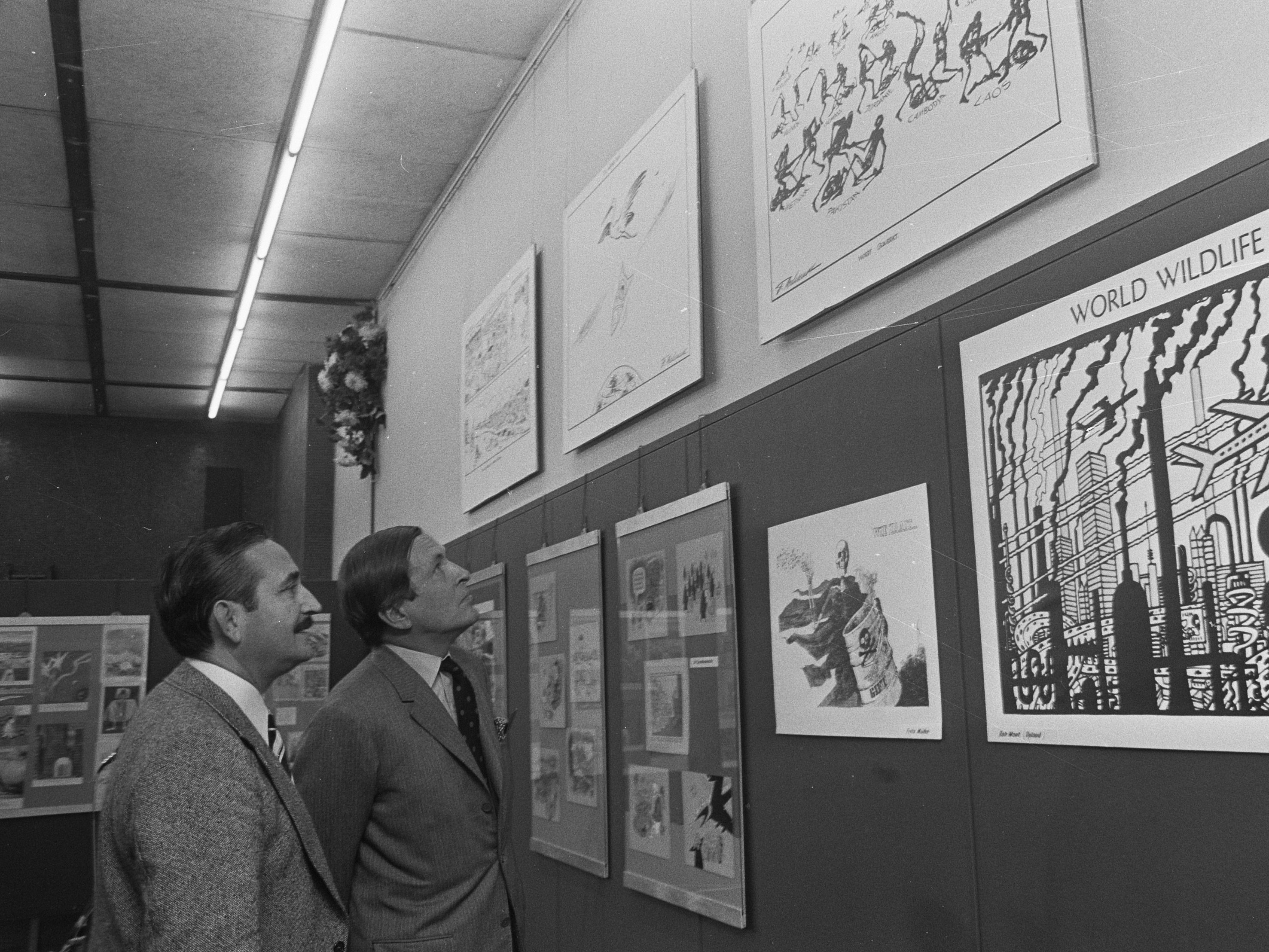 an cartoons in het gebouw van het Parool. De prins en cartoonist Fritz Behrendt bekijken cartoons Datum 9 november 1973